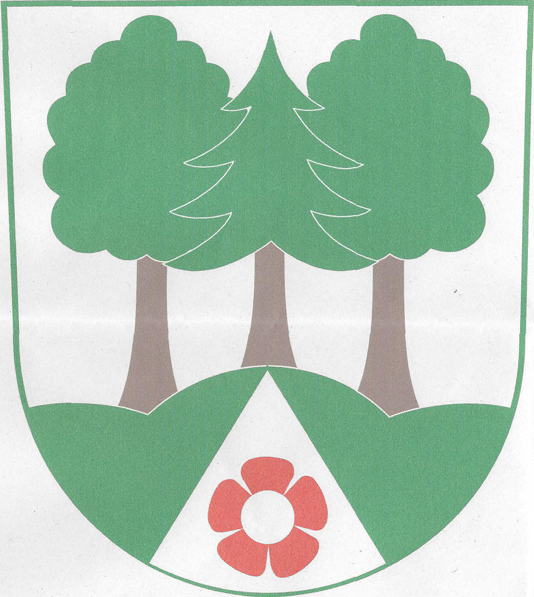 Znak obce Hvozdec